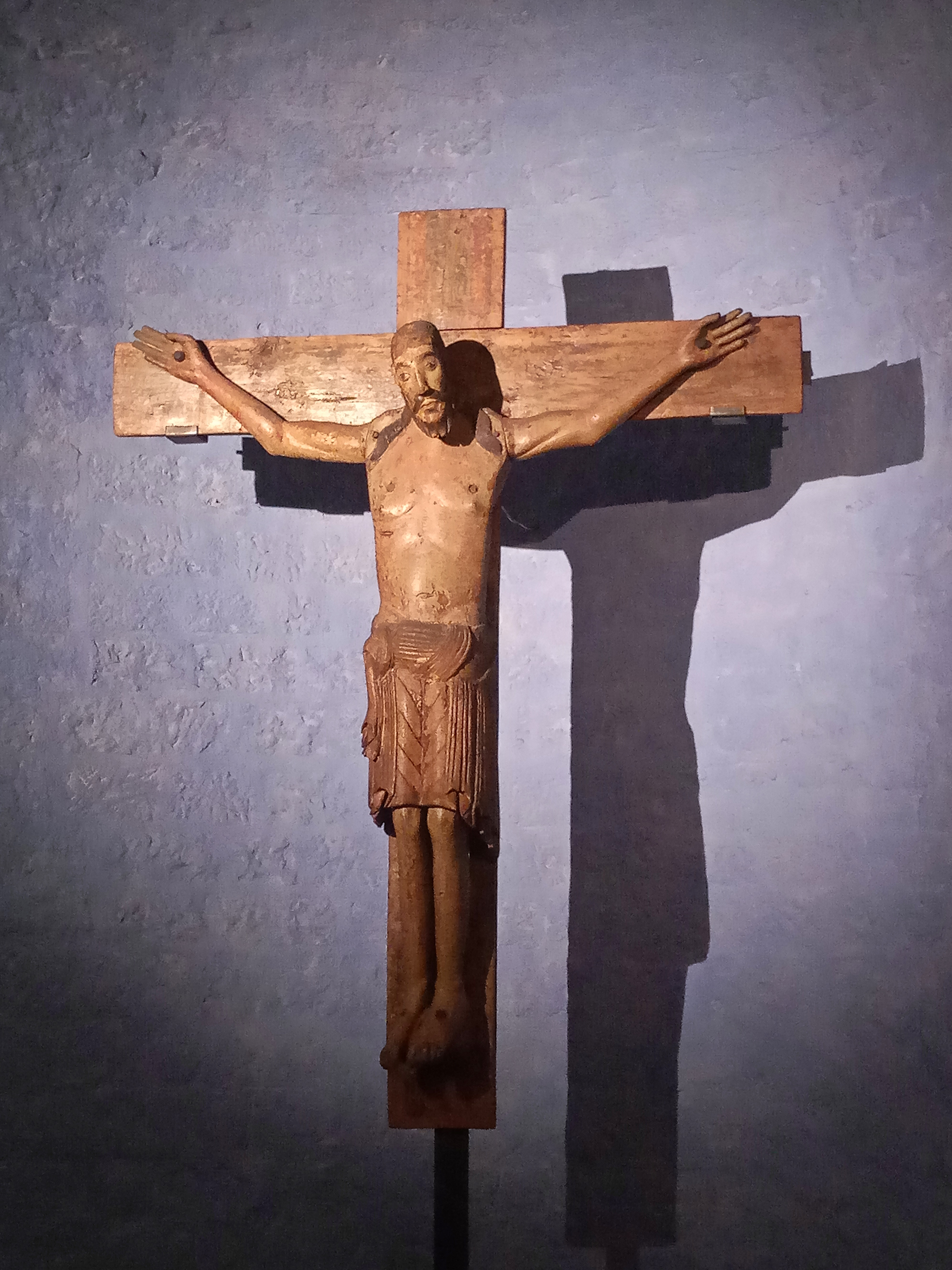 Udenheimer Kruzifix, Gotthardkapelle, Mainzer Dom